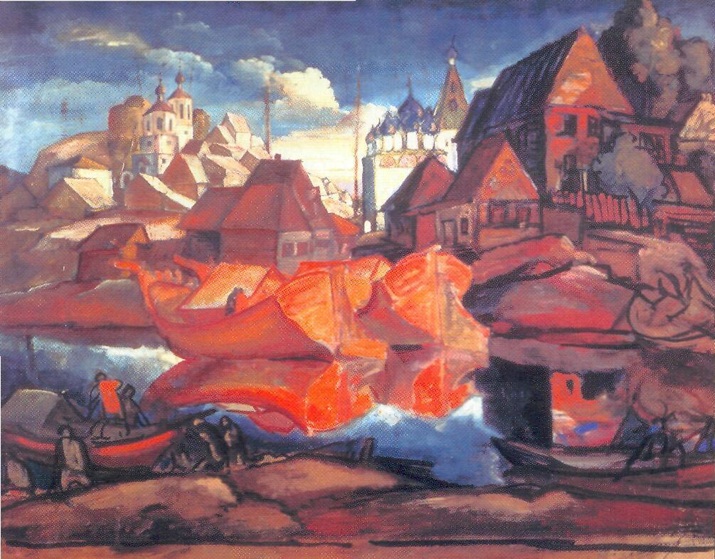 Alte russische Stadt. Rote Barken. (Древний русский город. Красные струги.)